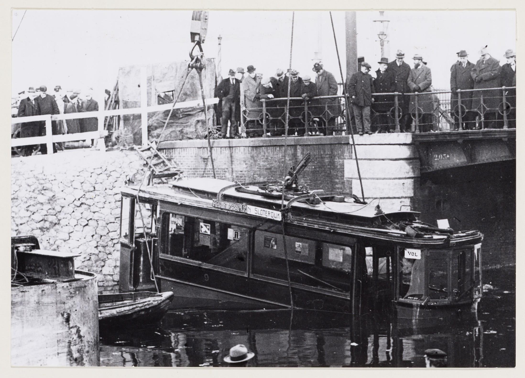 Beschrijving Singelgracht bij Nassauplein Motorwagen 9 van tramlijn 18 door een brok sneeuw ontspoord en te water geraakt. De tram wordt door een kraan opgehesen. Moderne afdruk van historisch negatief. Foto uit collectie T.W. Hogendijk. Documenttype foto Vervaardiger Onbekend Anoniem Collectie Collectie Stadsarchief Amsterdam: foto-afdrukken Datering 2 januari 1924 Geografische naam Nassauplein Singelgracht Inventarissen Afbeeldingsbestand OSIM00008001618